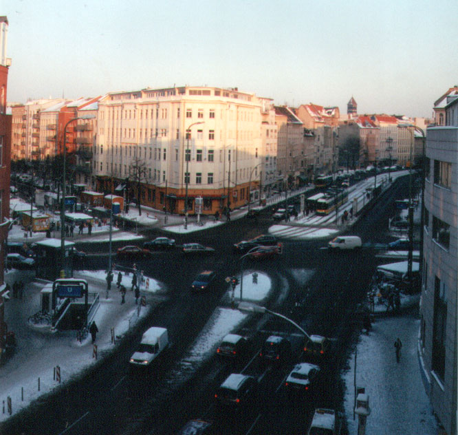 Rosenthaler Platz in Berlin-Mitte mit Blick Richtung Osten in die Torstraße